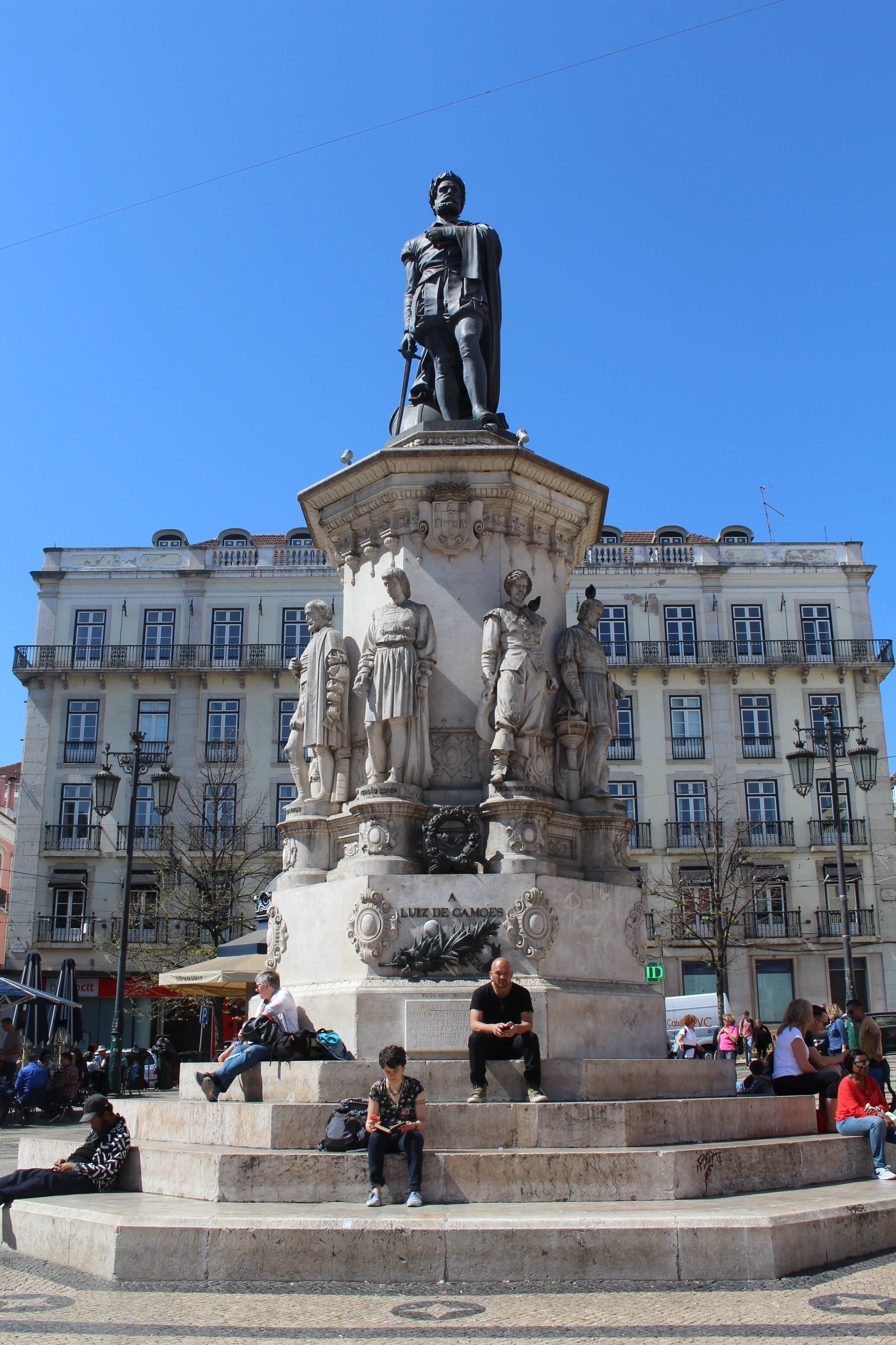 Monument à Luís Camões, Lisbonne.